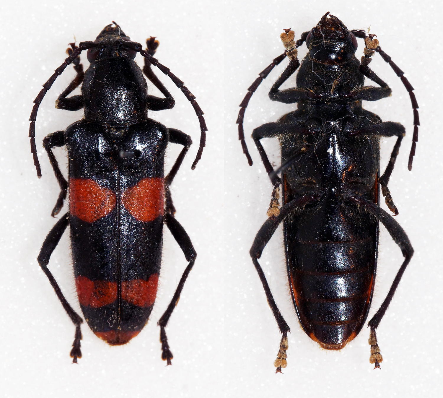 Dalman,1823 Sex: Male Data: 15-03-85 - San Pedro Columbia - Toledo - Belize Size: 18mm